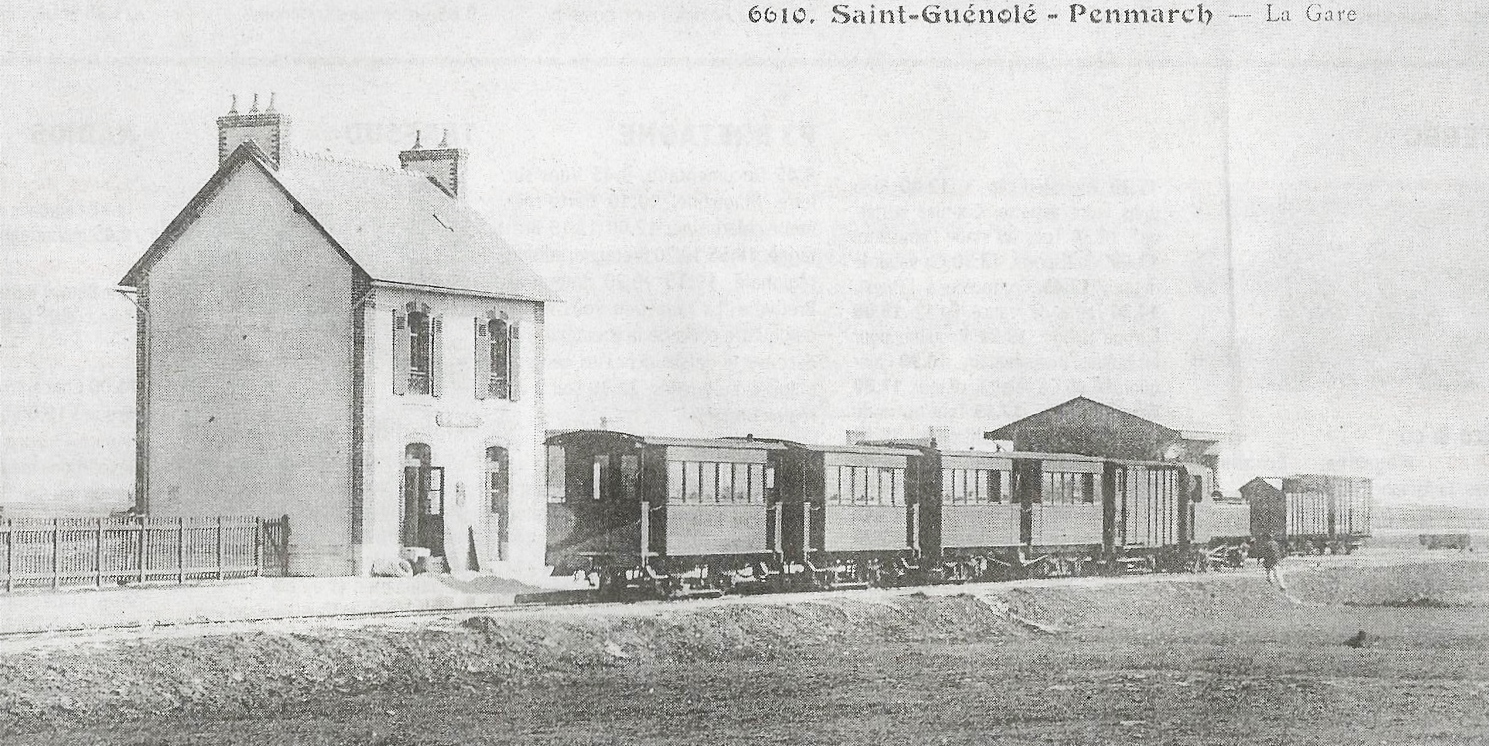 La gare de Saint-Guénolé-Penmarc'h (train birinik, photo datant d'avant 1930)